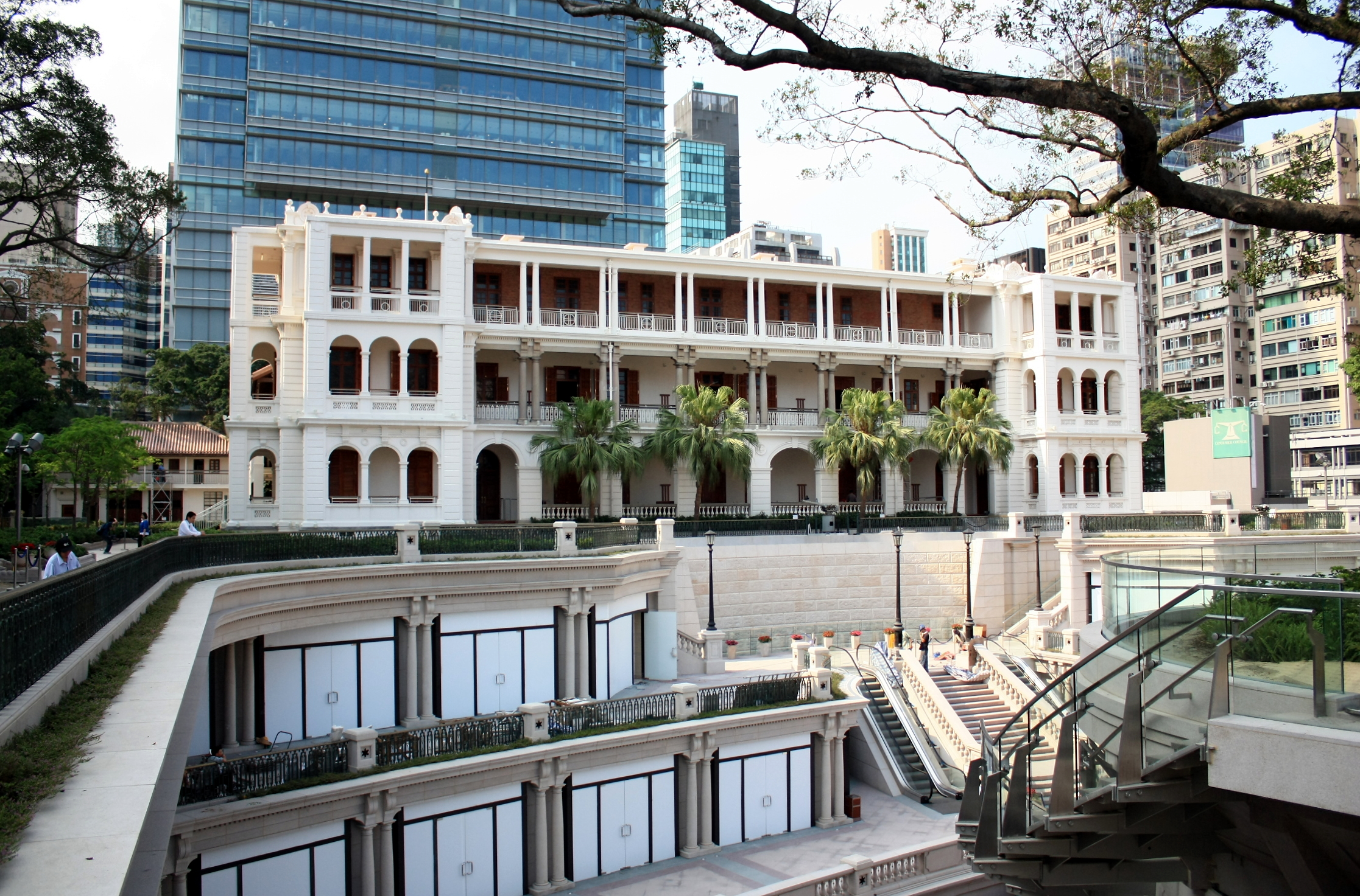 1881 Heritage